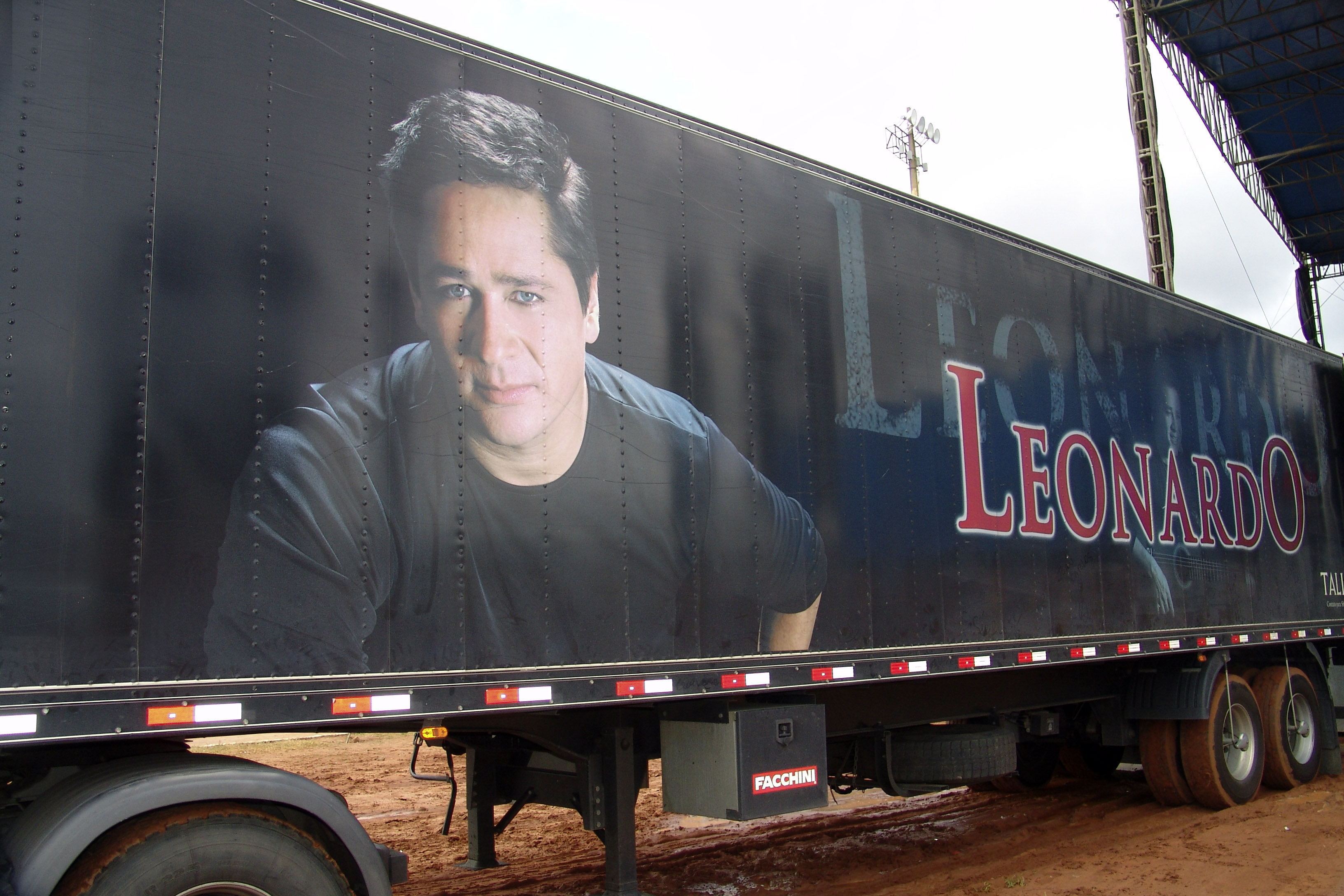 Cantor Leonardo (cantor), na EMAPA, Avaré